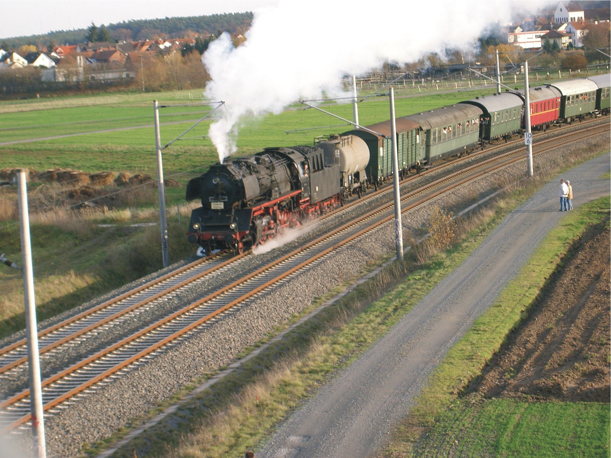 Nostalgiezug auf der S-Bahn-Strecke S1 zwischen Offenbach und Rodgau